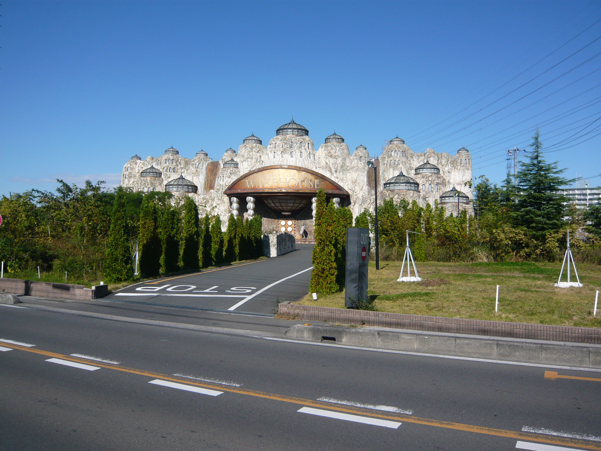 アミューズメントパークウェアハウス三橋店、埼玉県さいたま市西区。